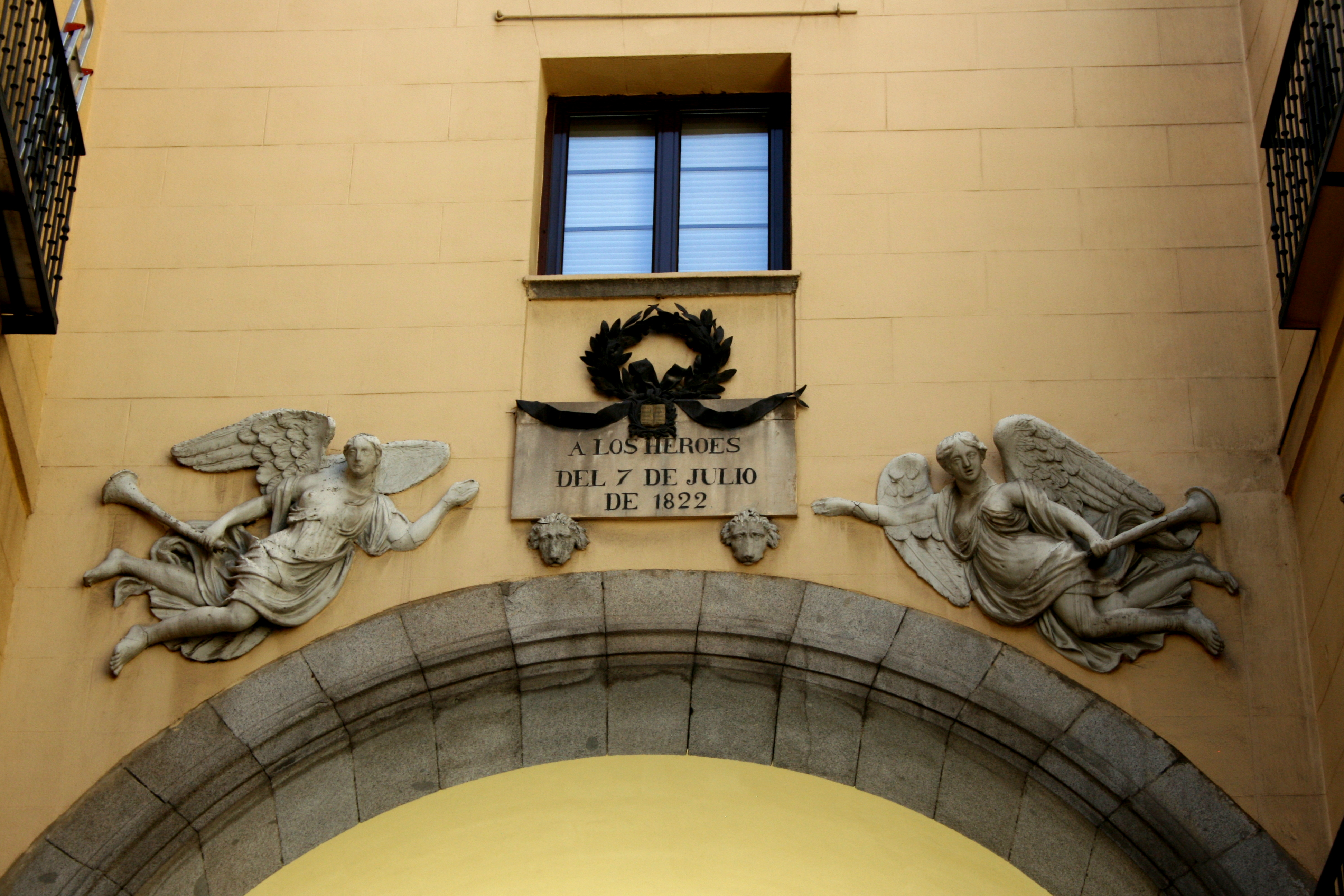 Lápida dedicada a los héroes del siete de julio de 1822 en el arco que comunica la calle del 7 de julio con la Plaza Mayor de Madrid